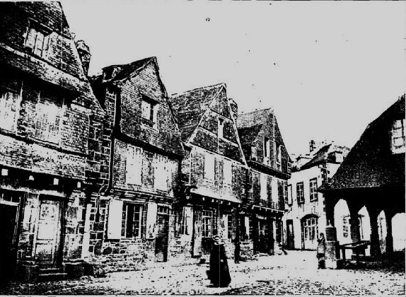 Vieilles maisons sur la commune du Faou dans le département français du Finistère en 1903.